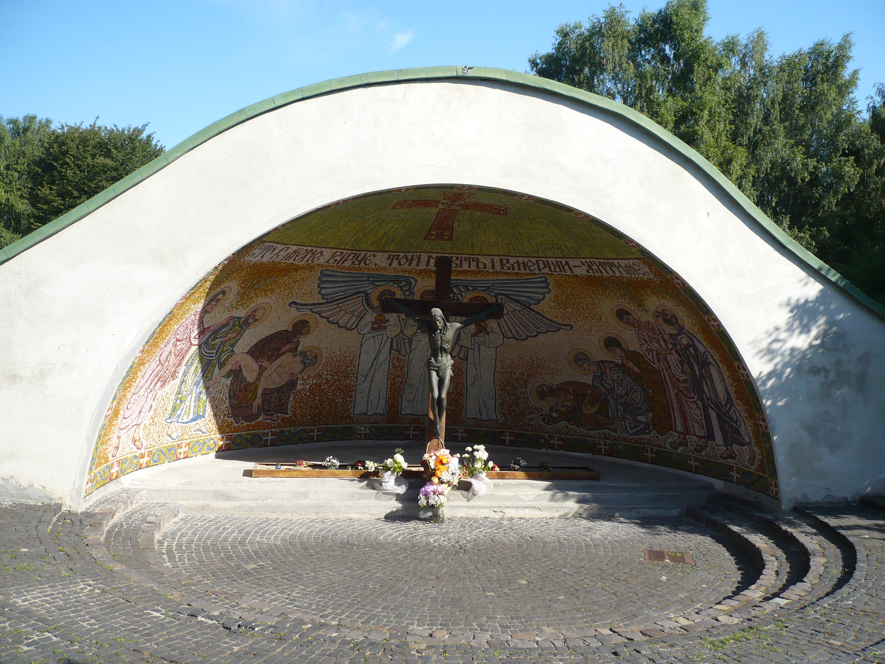 Kaplica ofiar NKWD z czerwca 1941 r. przy zamku w Złoczowie